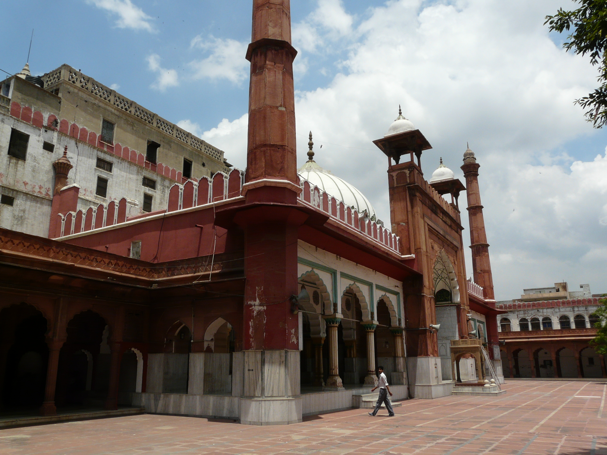 Fatehpuri Masjid Fatehpuri Masjid, Chandni Chowk, Delhi